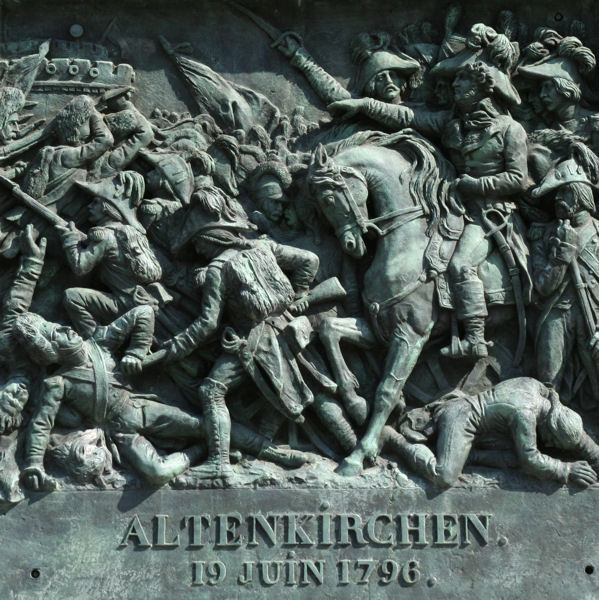 La Bataiile d Altenkirchen remportée par le général Kléber